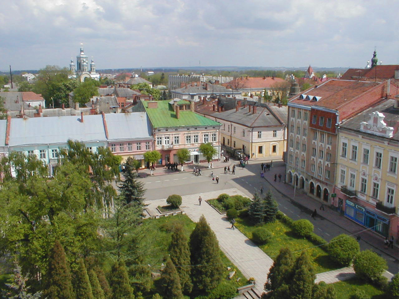 Самбір: Центр міста, Самбір